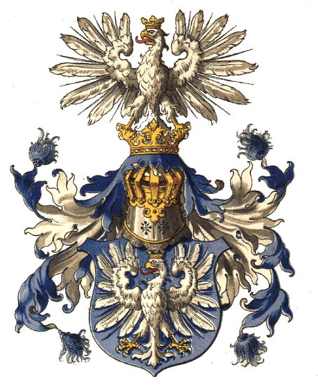 Herb Księstwa Modeny (wg: H.G.Ströhl, Oesterrichisch-Ungarische Wappenrolle, Wien 1890)